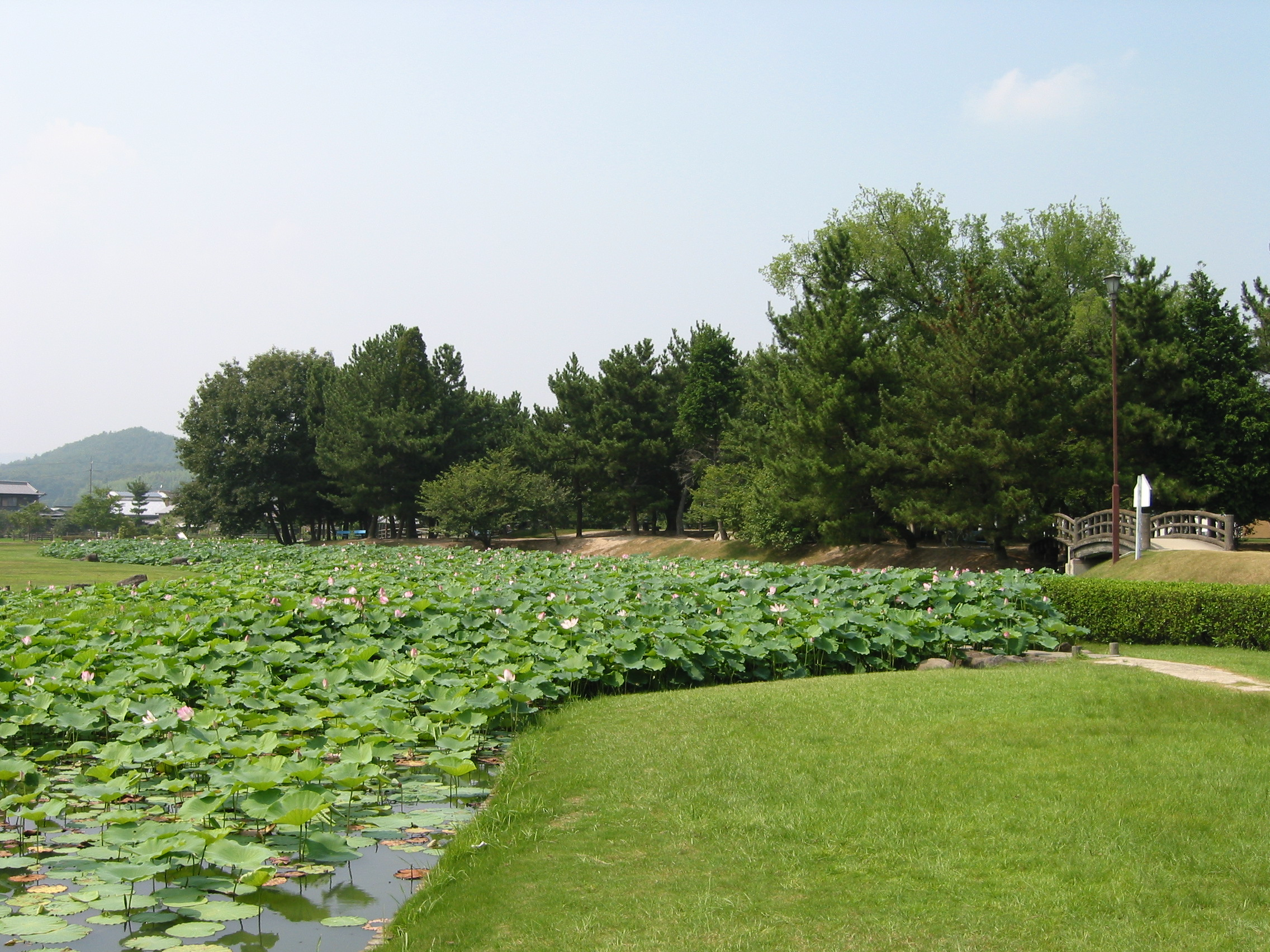 Bitchū Takamatsu Castle ruins (Japan's national historical site) Okayama City, Okayama, Japan